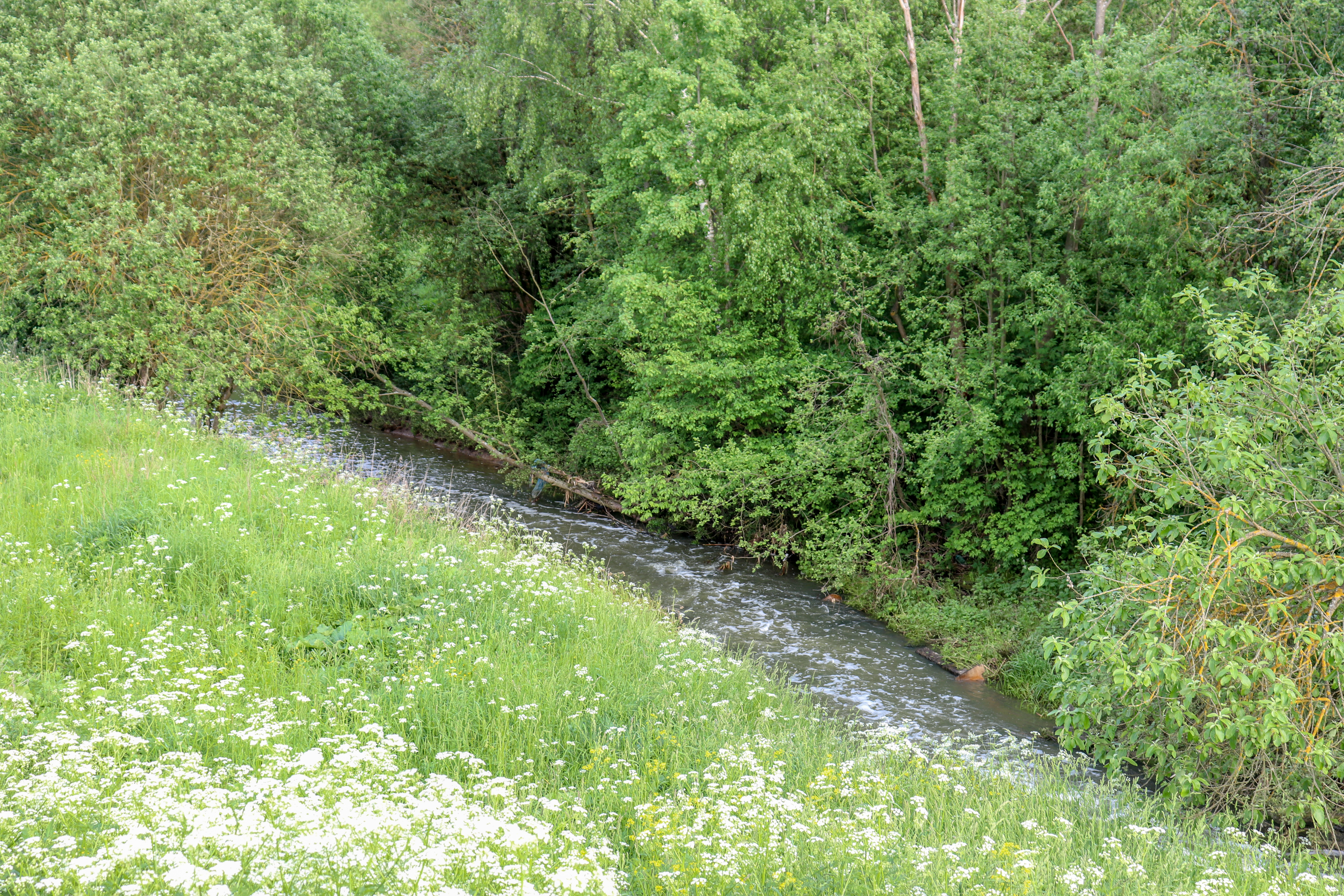 Река Сосенка у деревни Летово